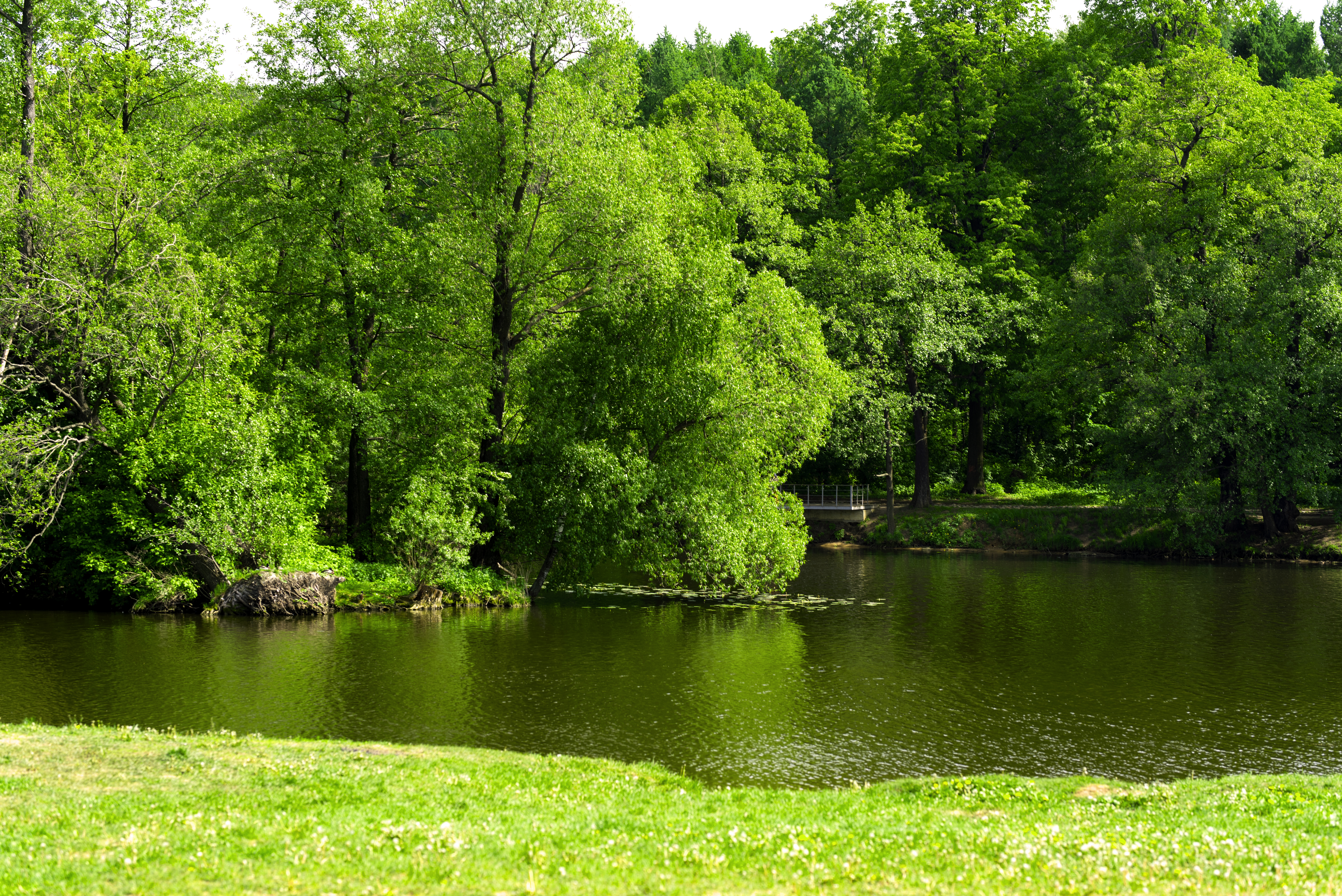 Прибрежная ива склонилась над водой в Кузьминском лесопарке: Юго-Восточный округ, Москва This image is related to the protected area of Russia number 7710012